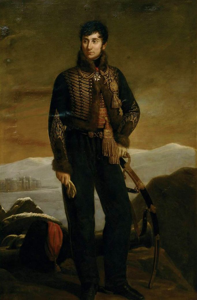 Jean-Jacques Desvaux de Saint-Maurice (1775-1815), général d'Empire et colonel de l'artillerie de la Garde impériale. Il est ici représenté en uniforme d'officier de l'artillerie à cheval de la Garde, où il a été major en 1809. Il est tué par un boulet de canon à la bataille de Waterloo, le 18 juin 1815.